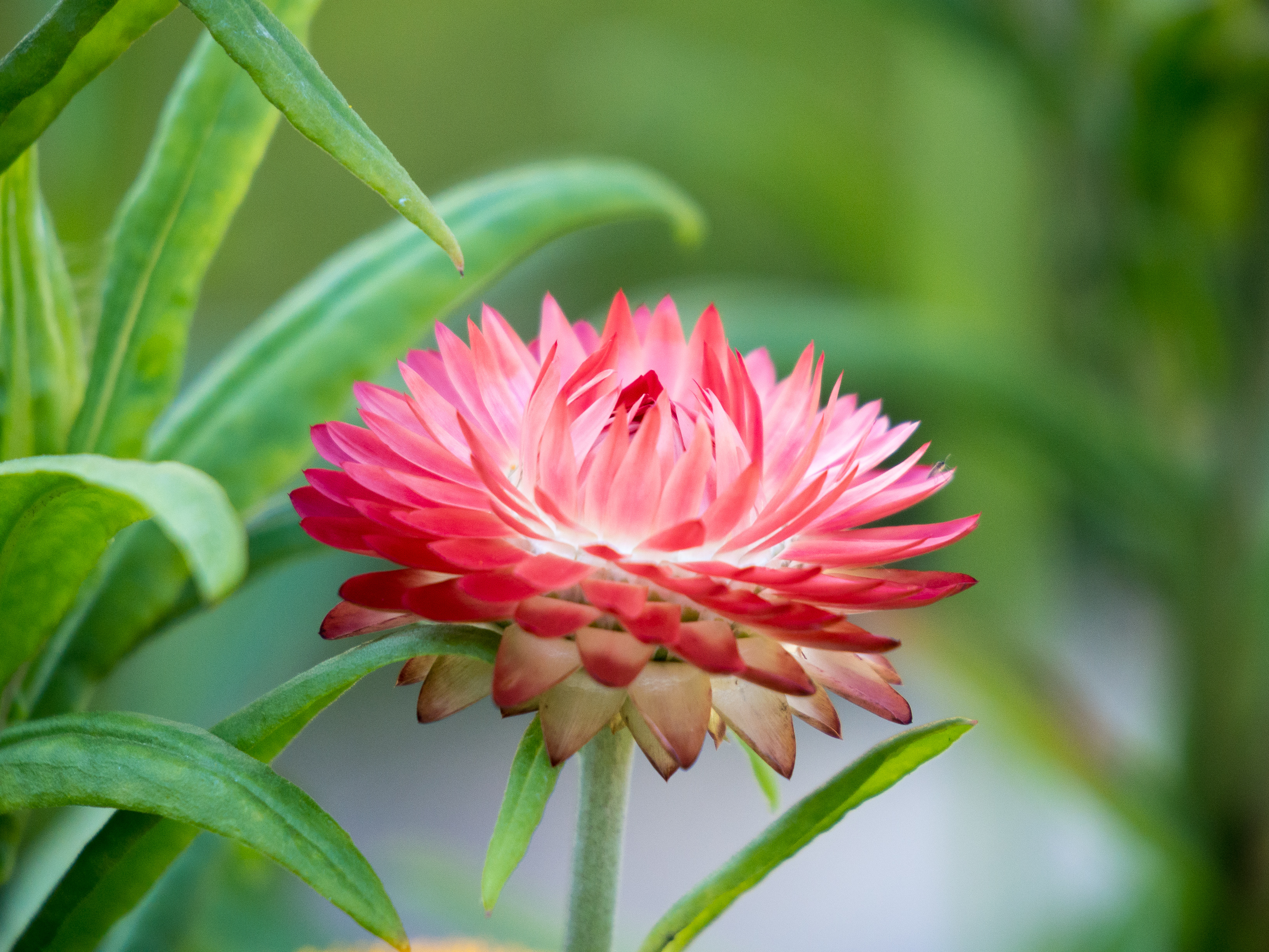 Die Garten-Strohblume (Xerochrysum bracteatum, Helichrysum bracteatum, Bracteantha bracteata)